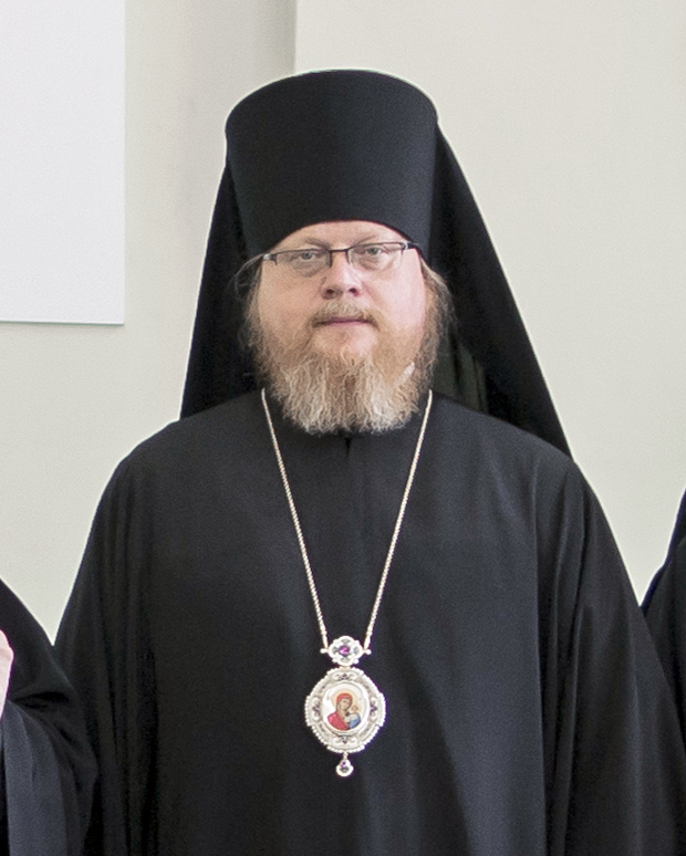 Епископ Тихон (заццев) на актовом дне в СПбДА. 1 сентября 2016